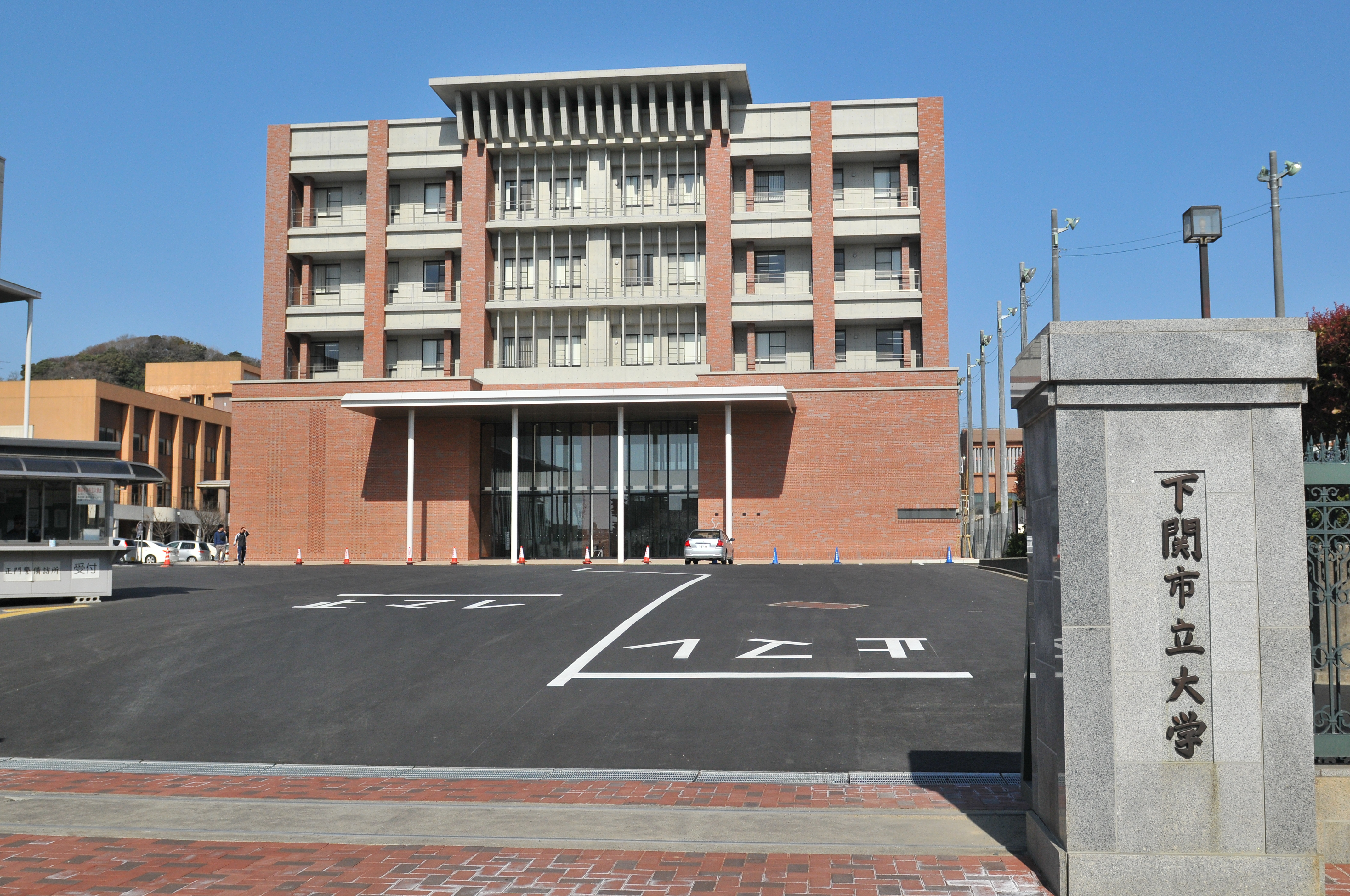 下関市立大学正門